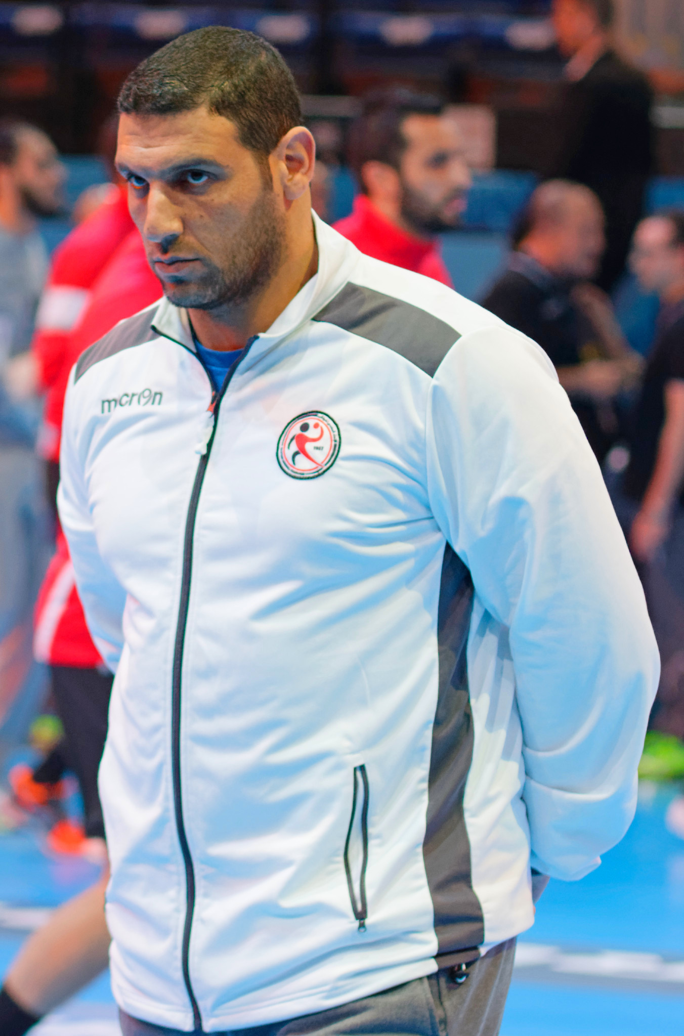 Match de la phase préliminaire du championnat du monde masculin de handball 2017 entre l'Egypte et le Danemark (Groupe D). A Bercy, le 14 janvier 2017.